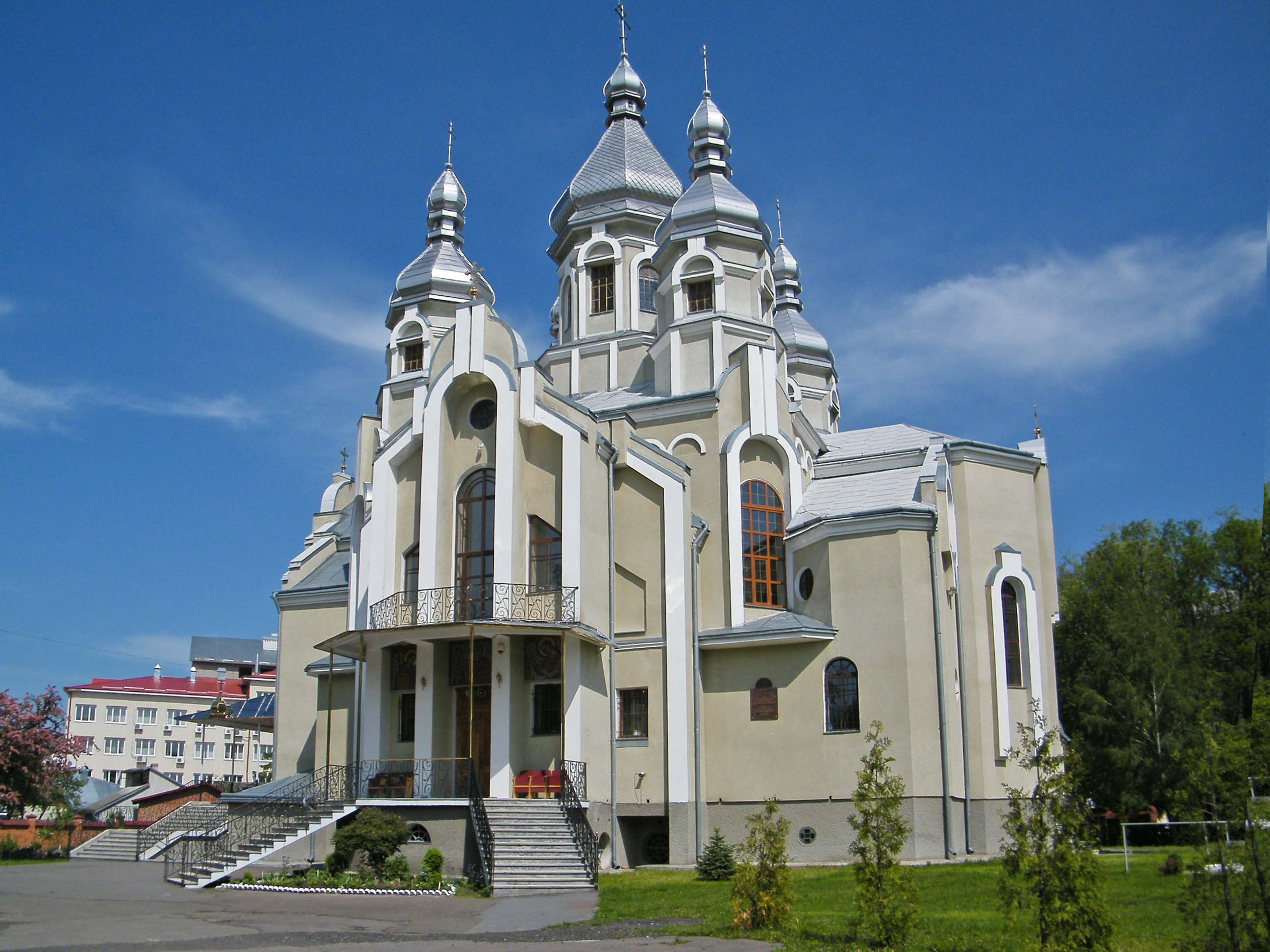 Церковь Андрея Первозванного